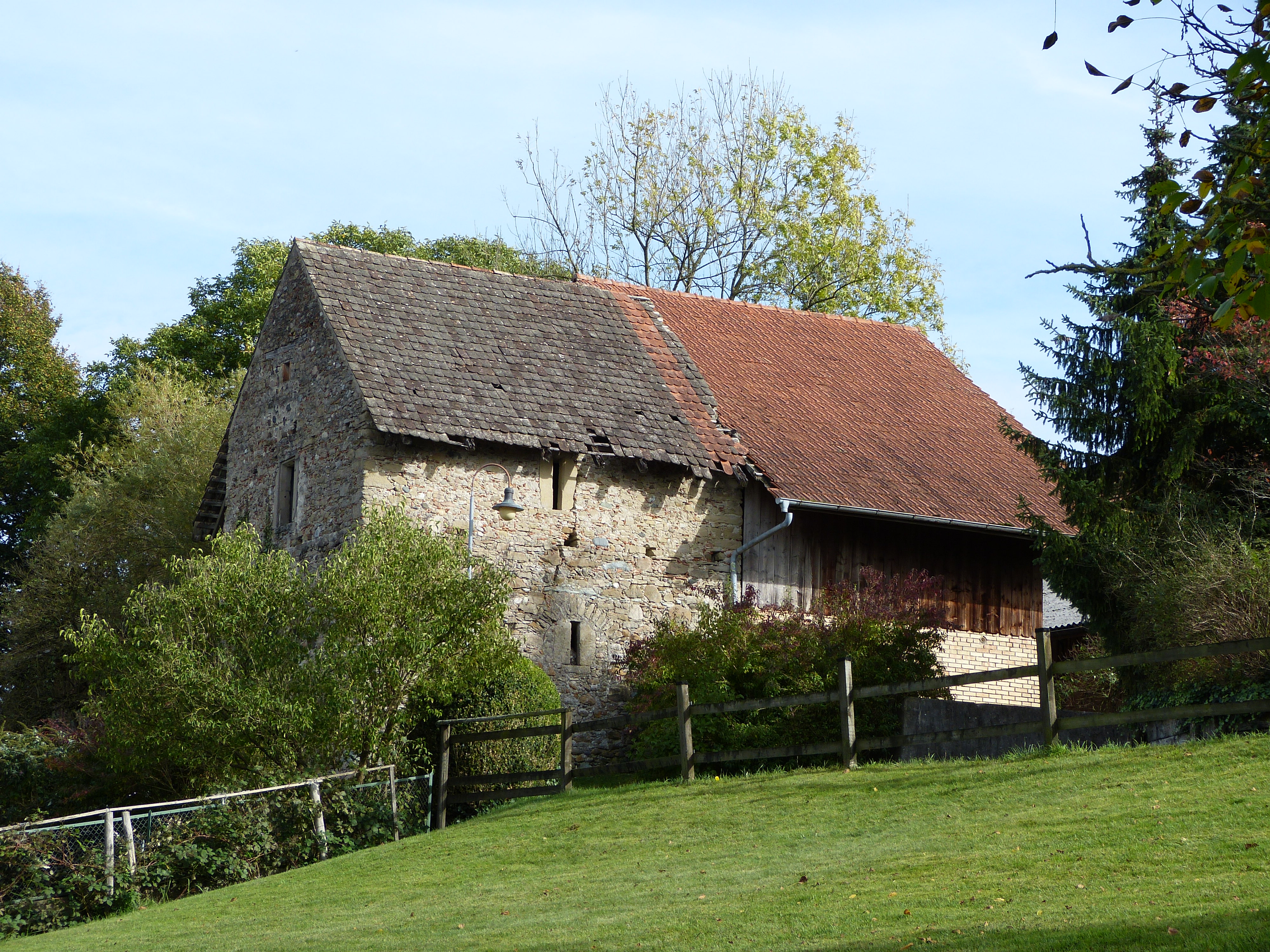 Ehemaliger Speicher